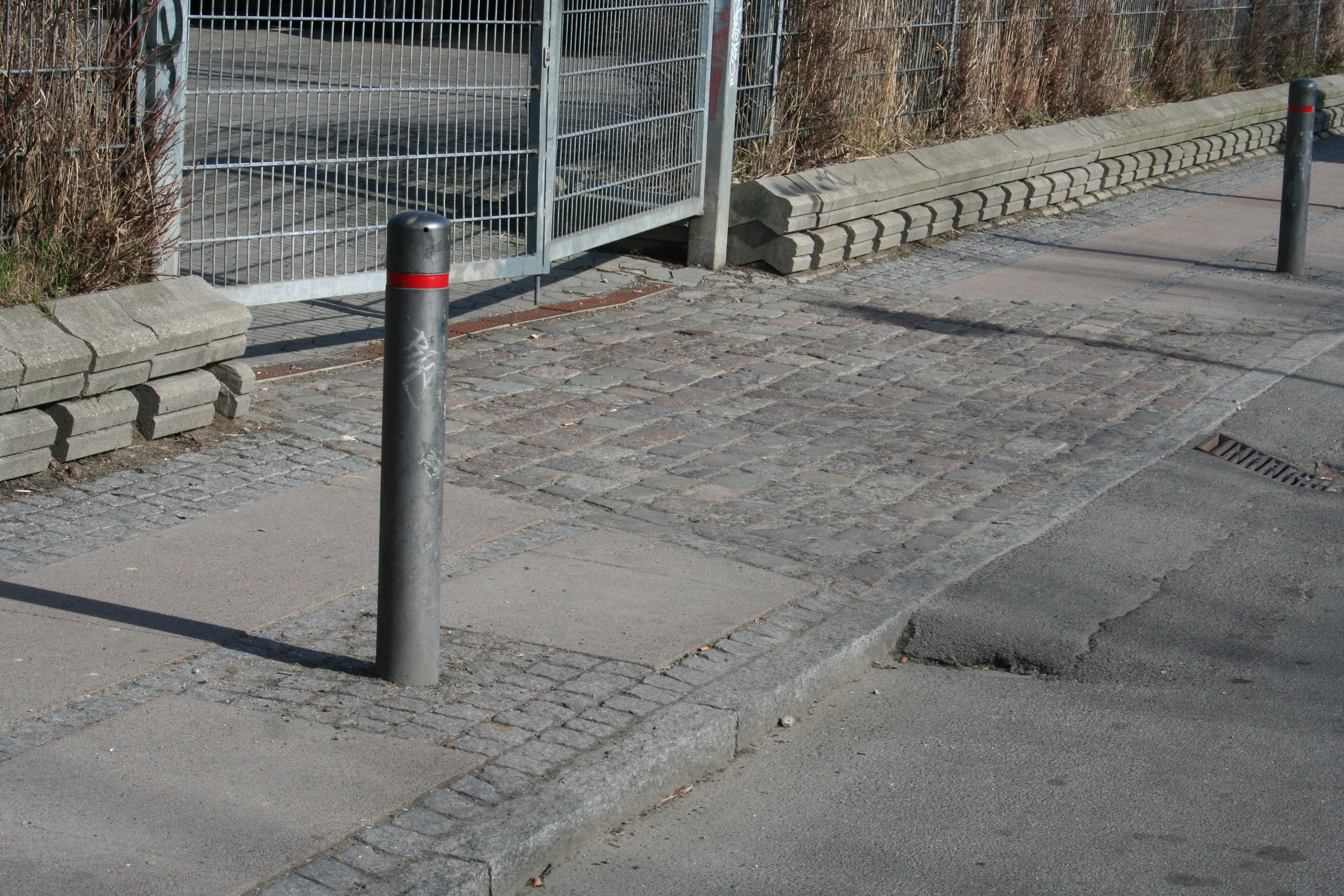 Pullert. Fotoet er taget på Refshalevej, København, Danmark, på positionen: 55.675106,12.60053. Bollard. Photograph has been taken at Refshalevej, Copenhagen, Denmark, at position: 55.675106,12.60053